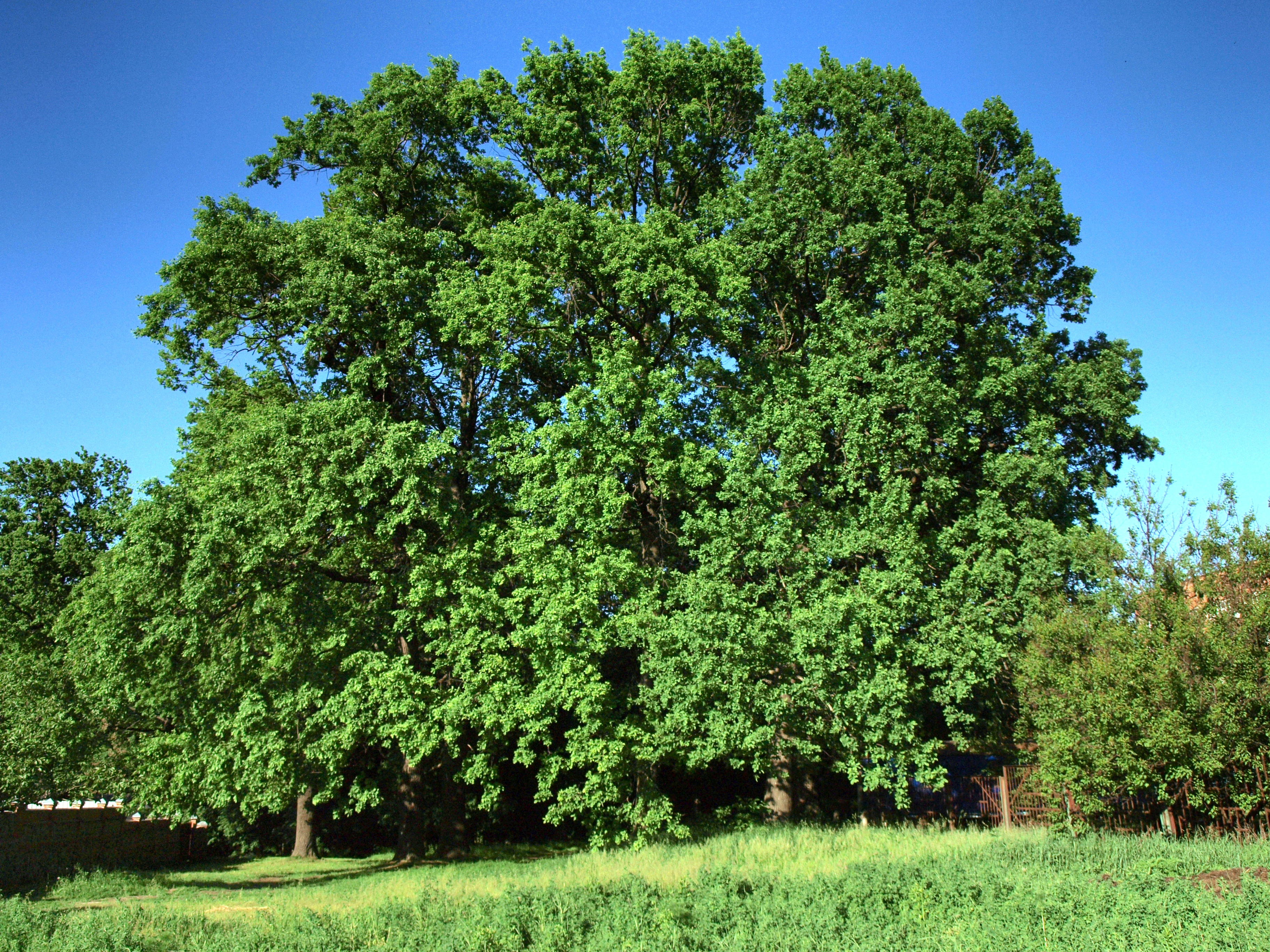 Дубовий гай, Полтавський р-н, с. Горбанівка